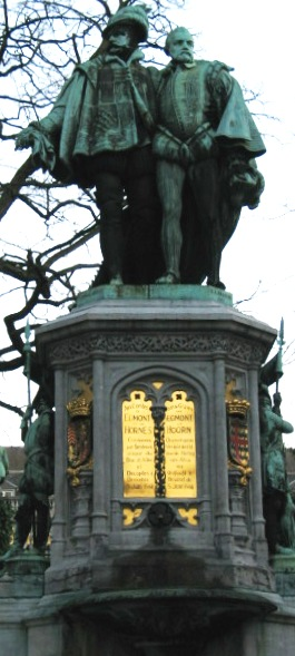 Egmont en Horne (15 jan 2005) - eigen foto